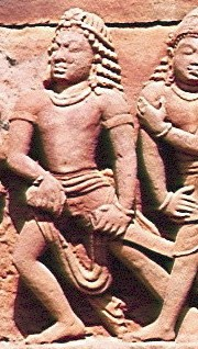 Deogarh. Nandaka face the demons Madhu-Kaitabha